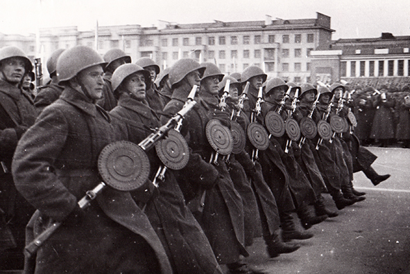 Стрелки с ручными пулеметами Дегтярева. Военный парад в Куйбышеве 7 ноября 1941 г.